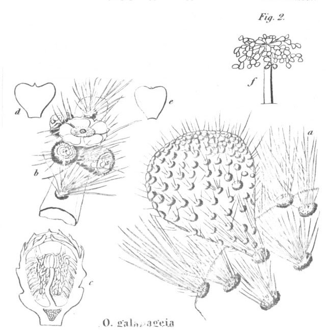 Tafel mit Abb. 2 zur Erstbeschreibung von Opuntia galapageia in Magazine of Zoology and Botany. Band 1, 1837